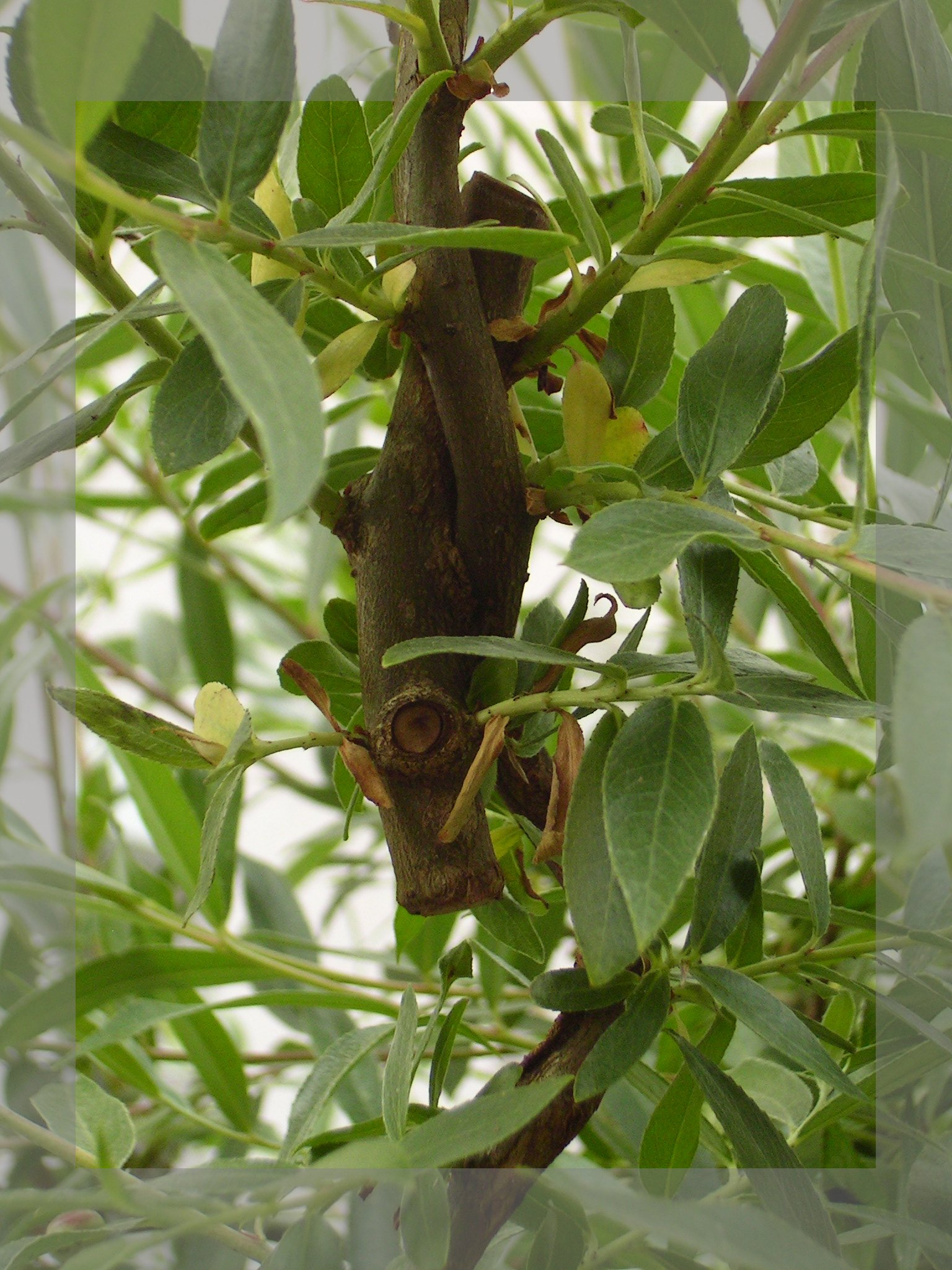 Weide (Salix). Das Zweigstück wurde mehr als eine Woche zuvor unten abgeschnitten und treibt nun trotzdem noch aus.